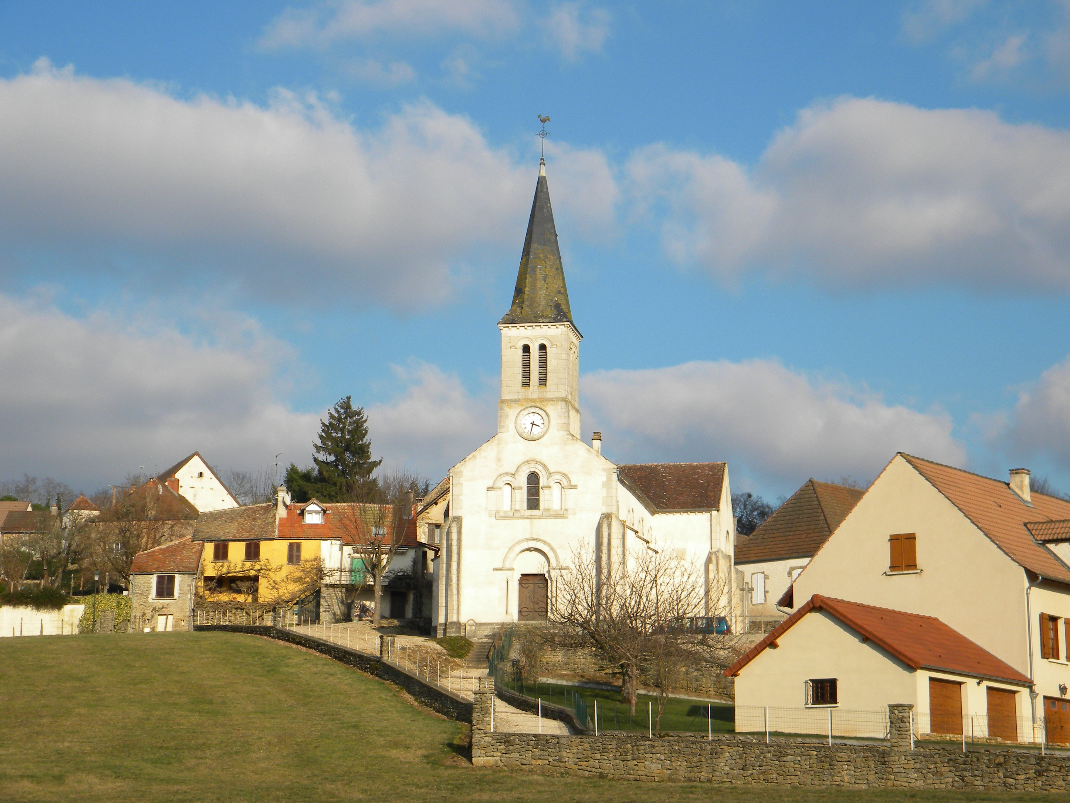 Change (Saône-et-Loire, France). Église Saint-Roch.